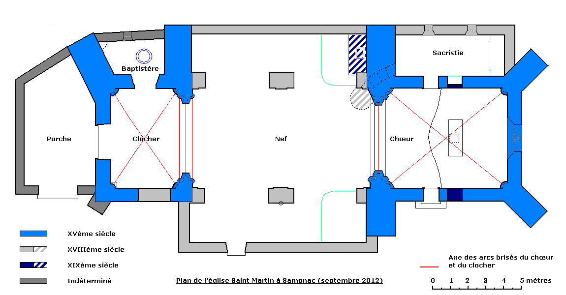 Samonac, Gironde (France); église Saint Martin, plan (09/2012).